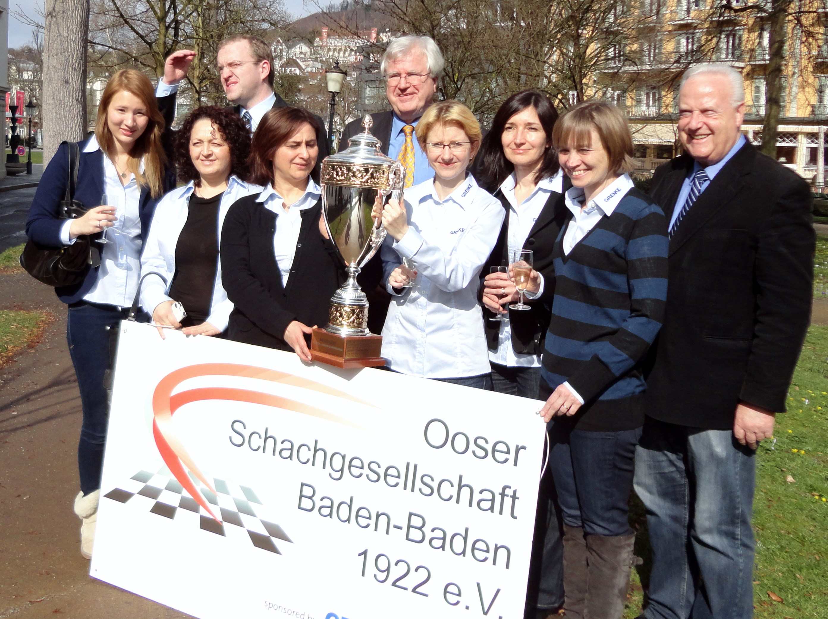 Die Siegermannschaft der Frauenbundesliga Saison 2012/2013: OSG Baden-Baden. Von links nach rechts: Lisa Schut, Ketino Kachiani-Gersinska, Sven Noppes, Iamze Tammert, Jens Thieleke, Eva Moser, Ketevan Arakhamia-Grant, Elena Sedina und ...